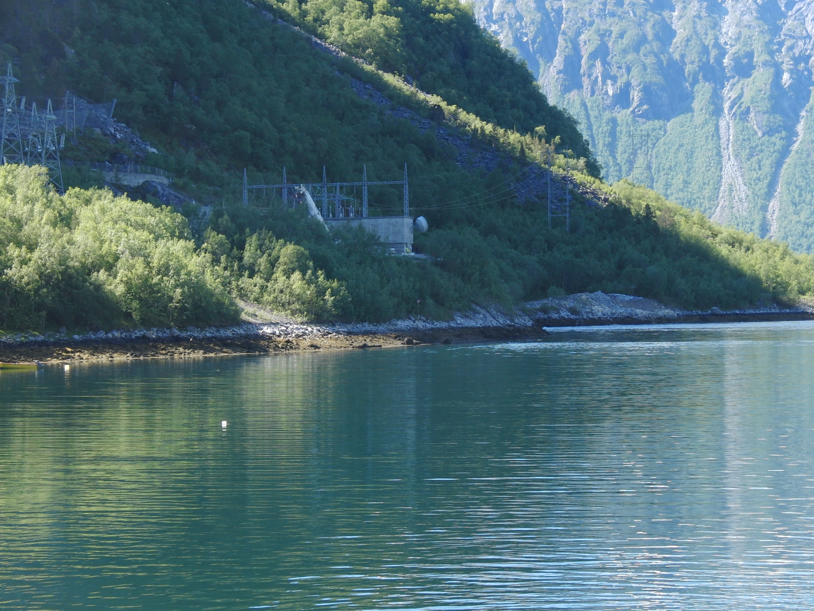 Skjomen kraftverk